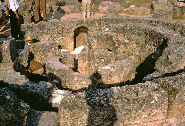 Tholos von Epidauros, Substrukturen